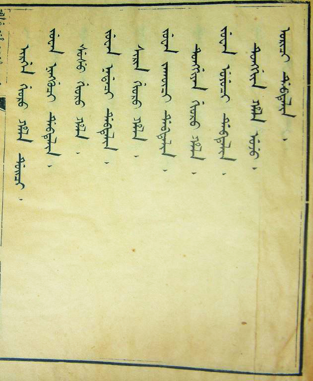 清文《八旗满洲氏族通谱》目录：第十五卷-伊尔根觉罗氏四、第十六卷-舒舒觉罗氏、第十七卷-西林觉罗氏、第十八卷-佟佳觉罗氏、第十九卷-佟佳氏一。